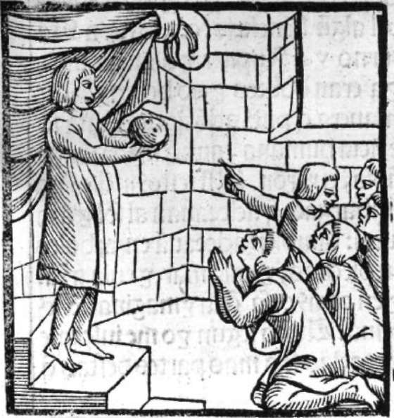 Рисунок из Хроники Перу, 1553